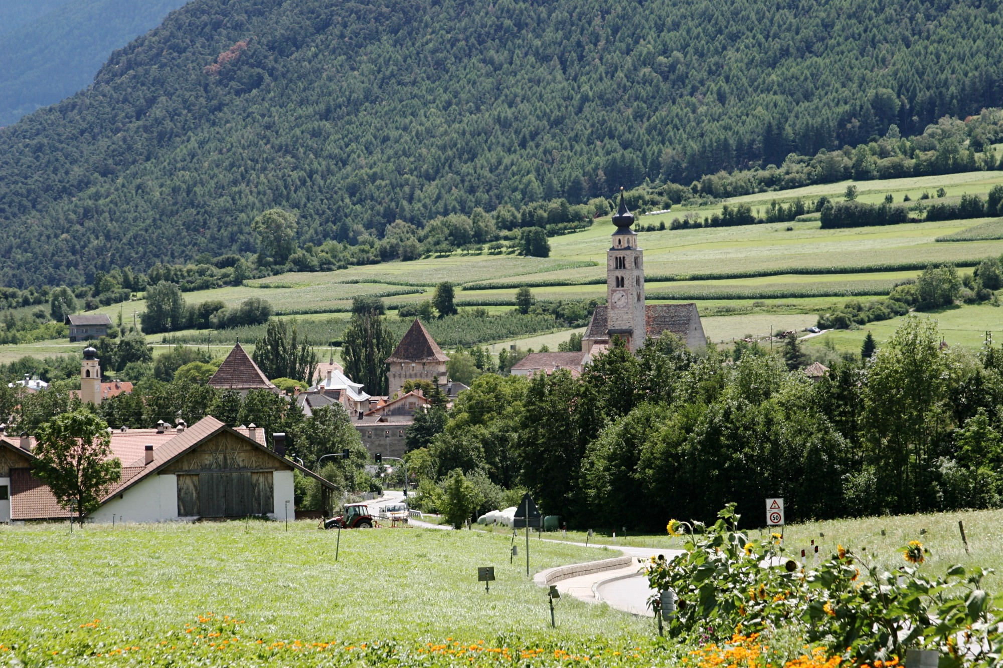 Glurns/Glorenza town in South Tyrolean Vinschgau/Val Venosta - Die Stadt Glurns/Glorenza im Südtiroler Vinschgau/Val Venosta own image, taken August 04, 2005 Photographer: Herbert Ortner, Vienna, Austria